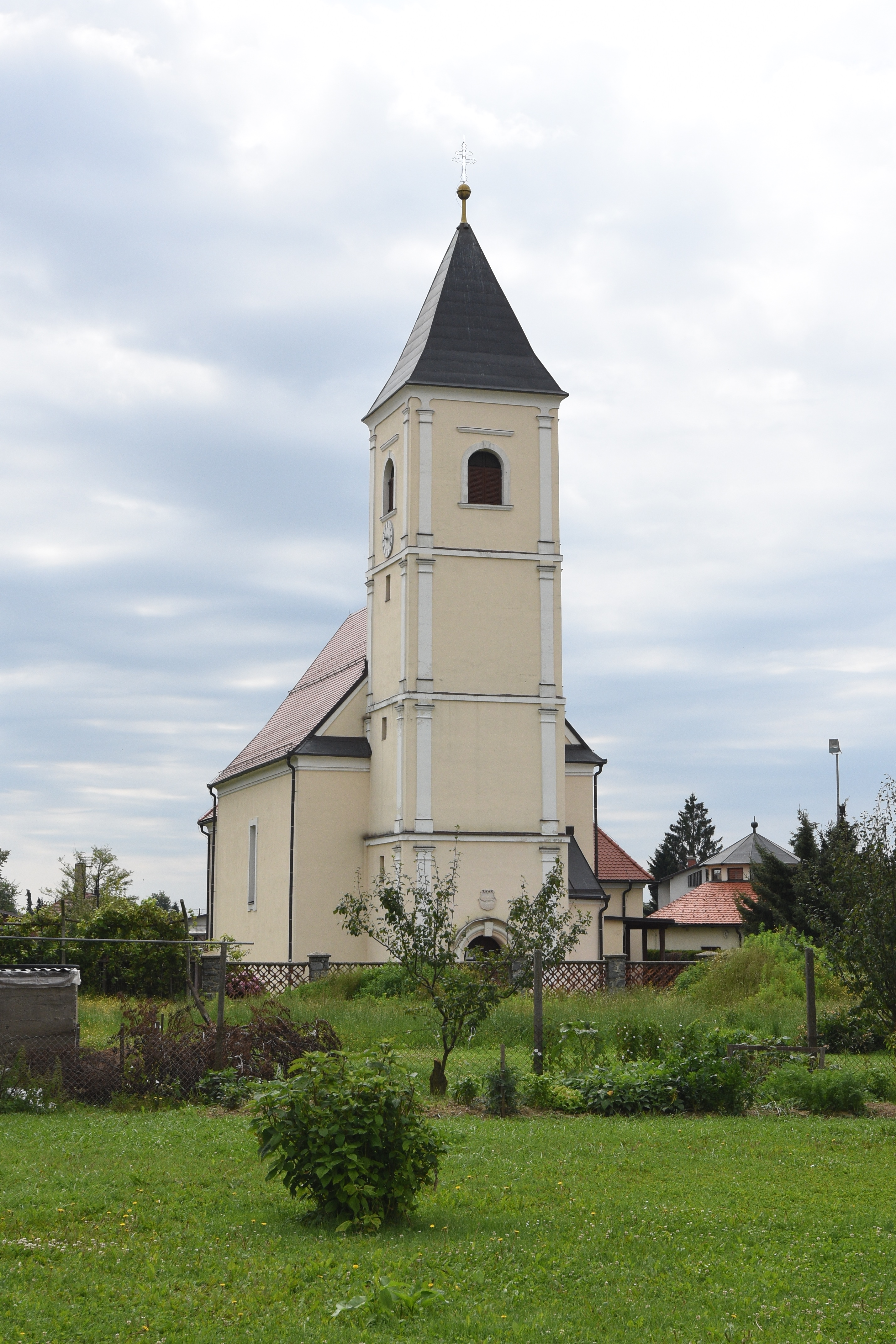 Župnijska cerkev sv. Mihaela , Parish church Saint Michael (Veržej)